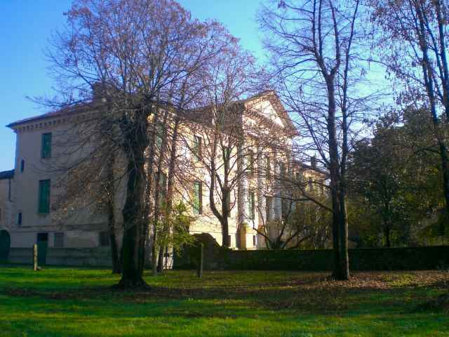 Abano Terme, Villa Rigoni Savioli: facciata della villa vista dal parco ad ovest, foto di Nicoletta Rigoni Savioli, licenza libera